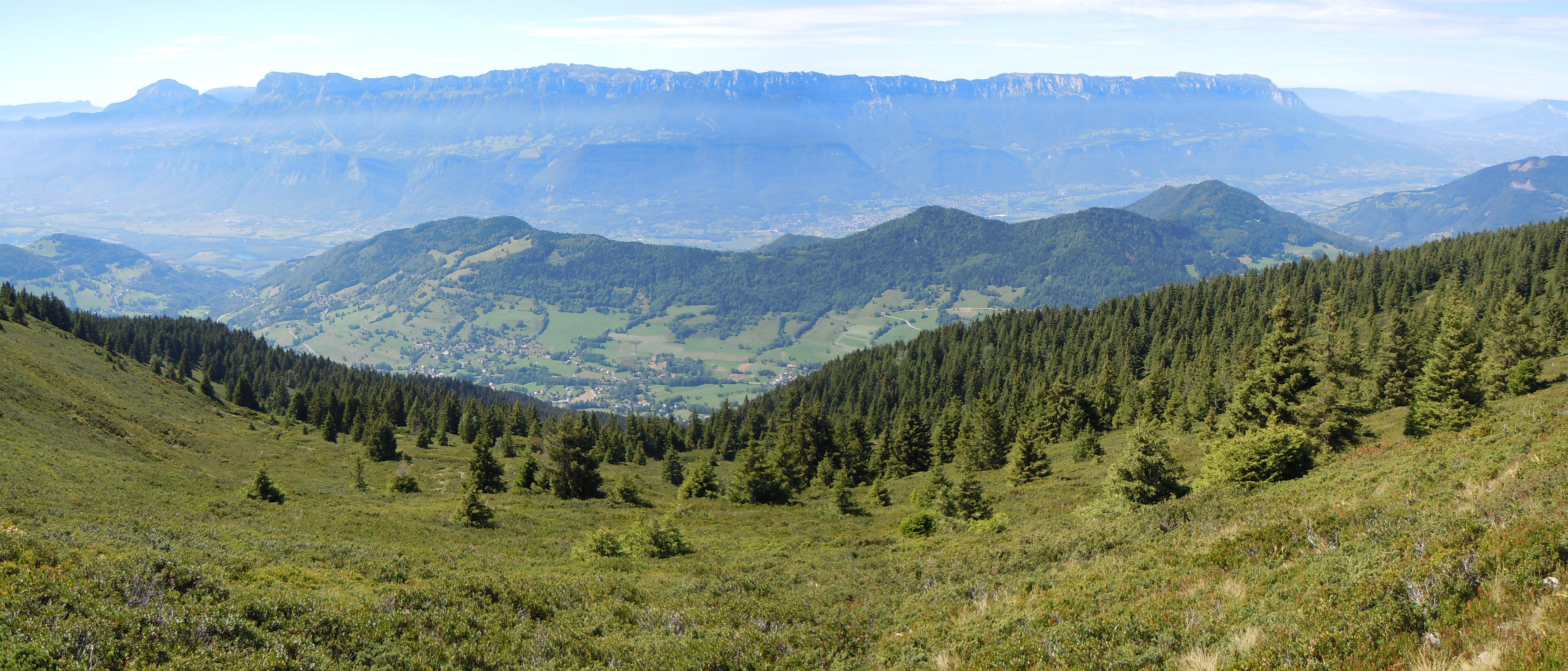 Massif de la Chartreuse depuis le Crêt Luisard et le Grand Rocher - Saint-Pierre-d'Allevard - Isère - France